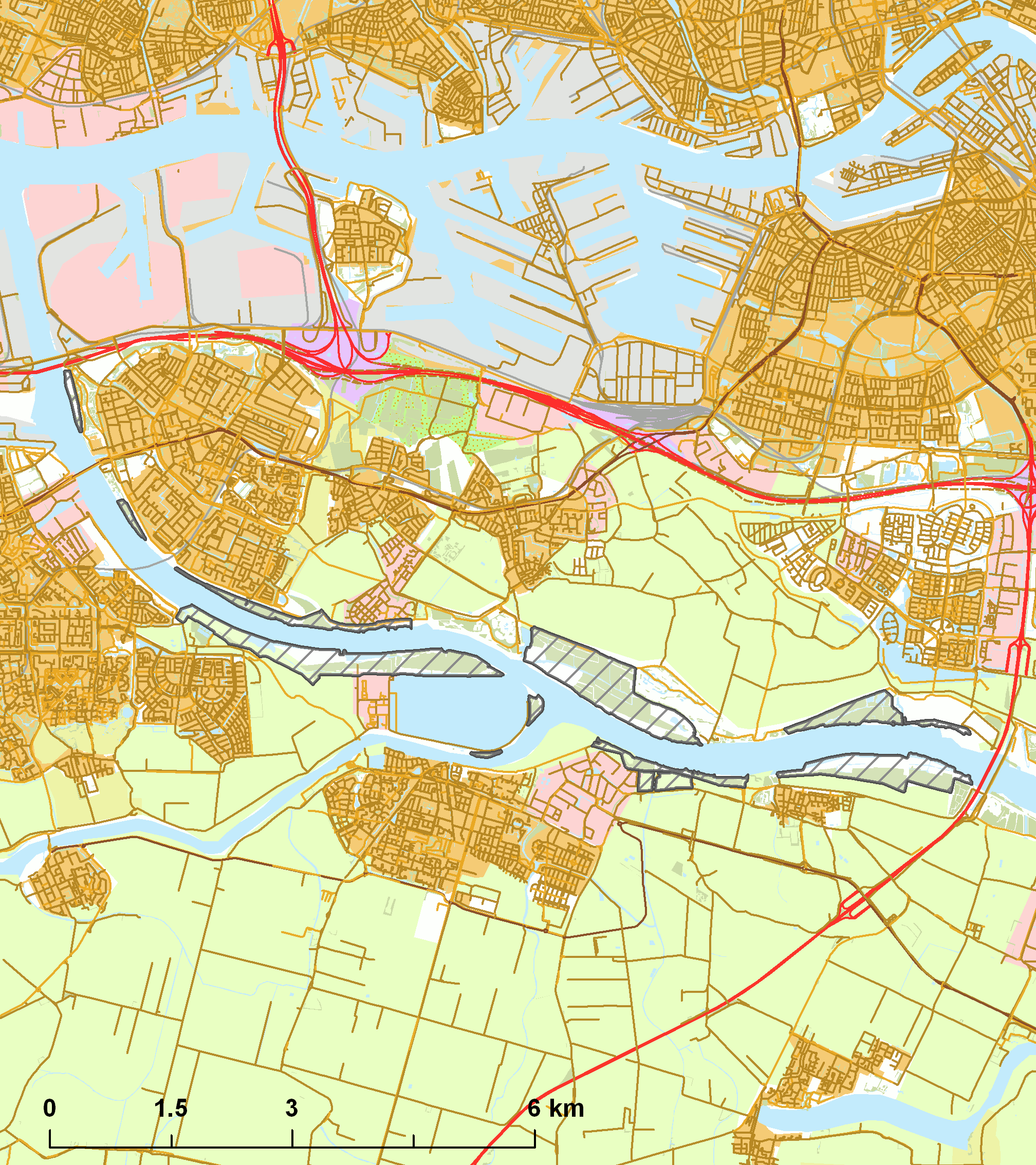 Natura2000 - Oude Maas.png